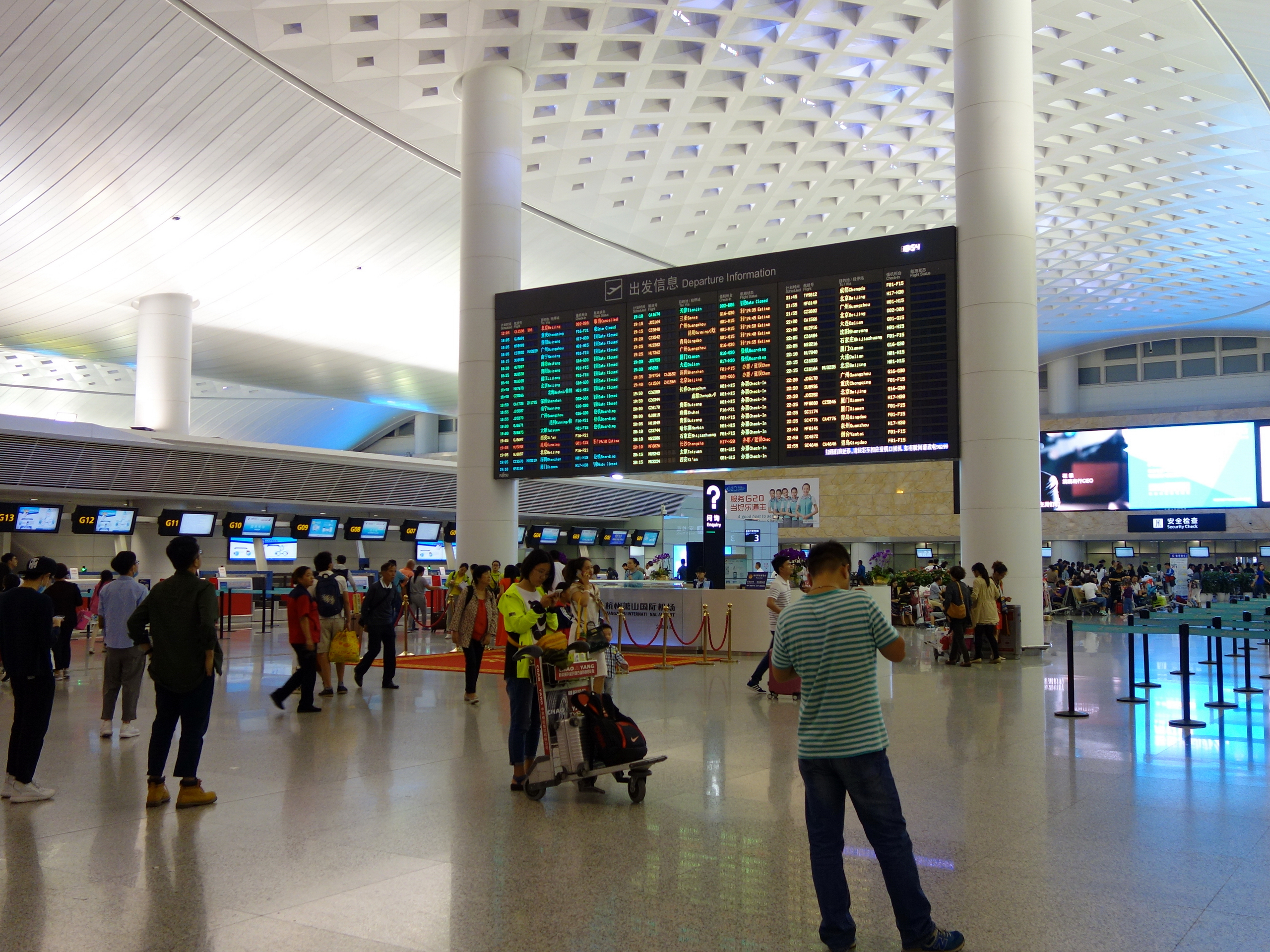 杭州萧山国际机场3号航站楼出发层国内办票大厅内景